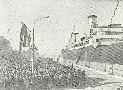 Množica na otvoritvi koprskega pristanišča